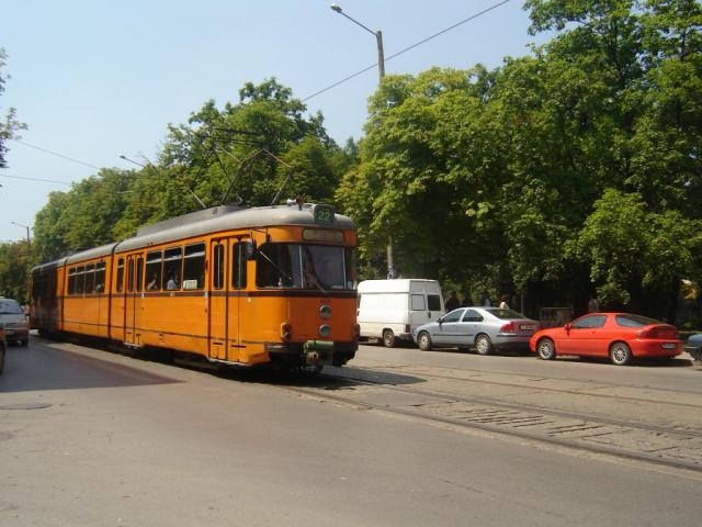 Tranvía en el centro de Sofía, Bulgaria.